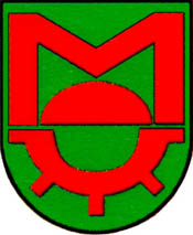 Herb gminy, później miasta Marki, od 1998 nowy wzór